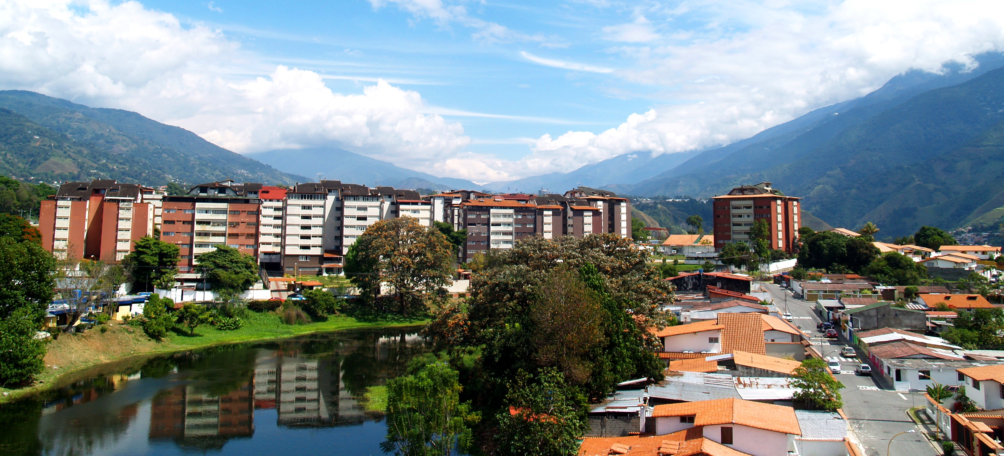 Un mar entre montes. Mérida